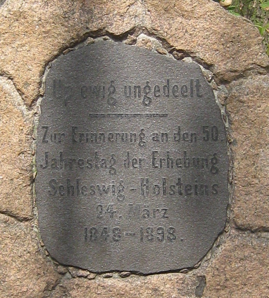 Fotografie des Gedenksteins beim Rathaus Elmshorn zur Erinnerung an die Erhebung Schleswig-Holsteins (1848)